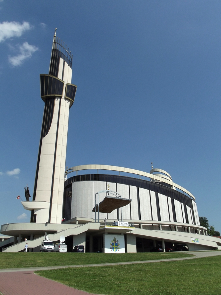 Zdjęcie zrobione podczas wydarzenia w "Rio w Krakowie", w Sanktuarium Bożego Miłosierdzia w Łagiewnikach.